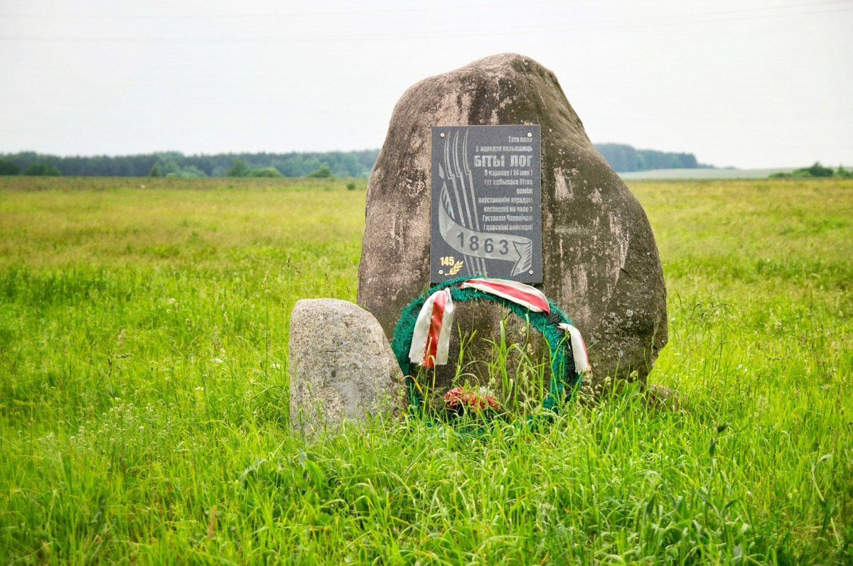 Біты Лог (каля в. Каралеўцы). Помнік: "Гэта поле ў народзе называюць БІТЫ ЛОГ 5 чэрвеня (24 мая) тут адбылася бітва паміж паўстанцкімі атрадамі касінераў на чале з Густавам Чаховічам і царскімі войскамі